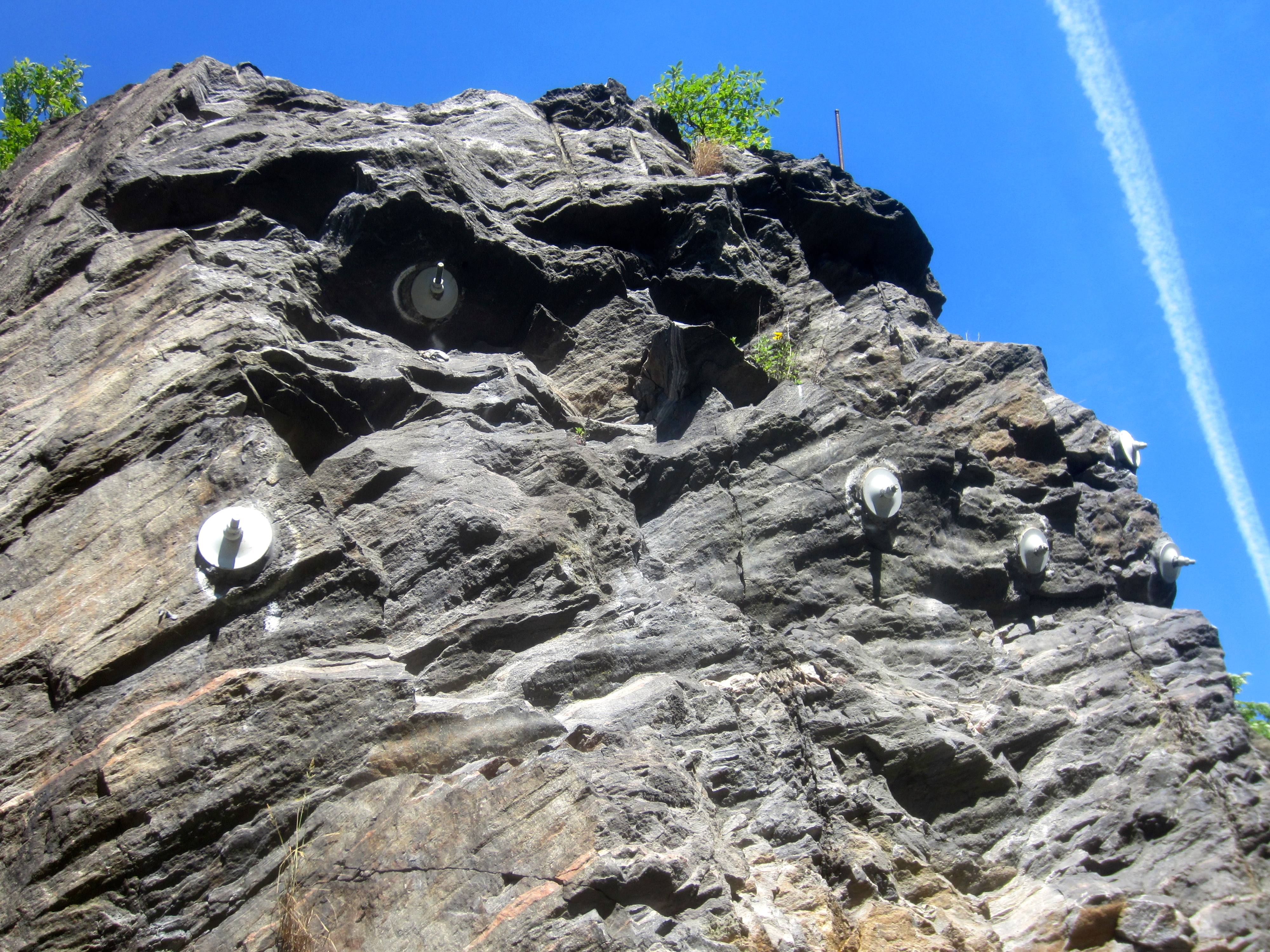 Bultat berg på Otterhällan, Göteborg. Förstärkning av berget för att reducera rasrisken.